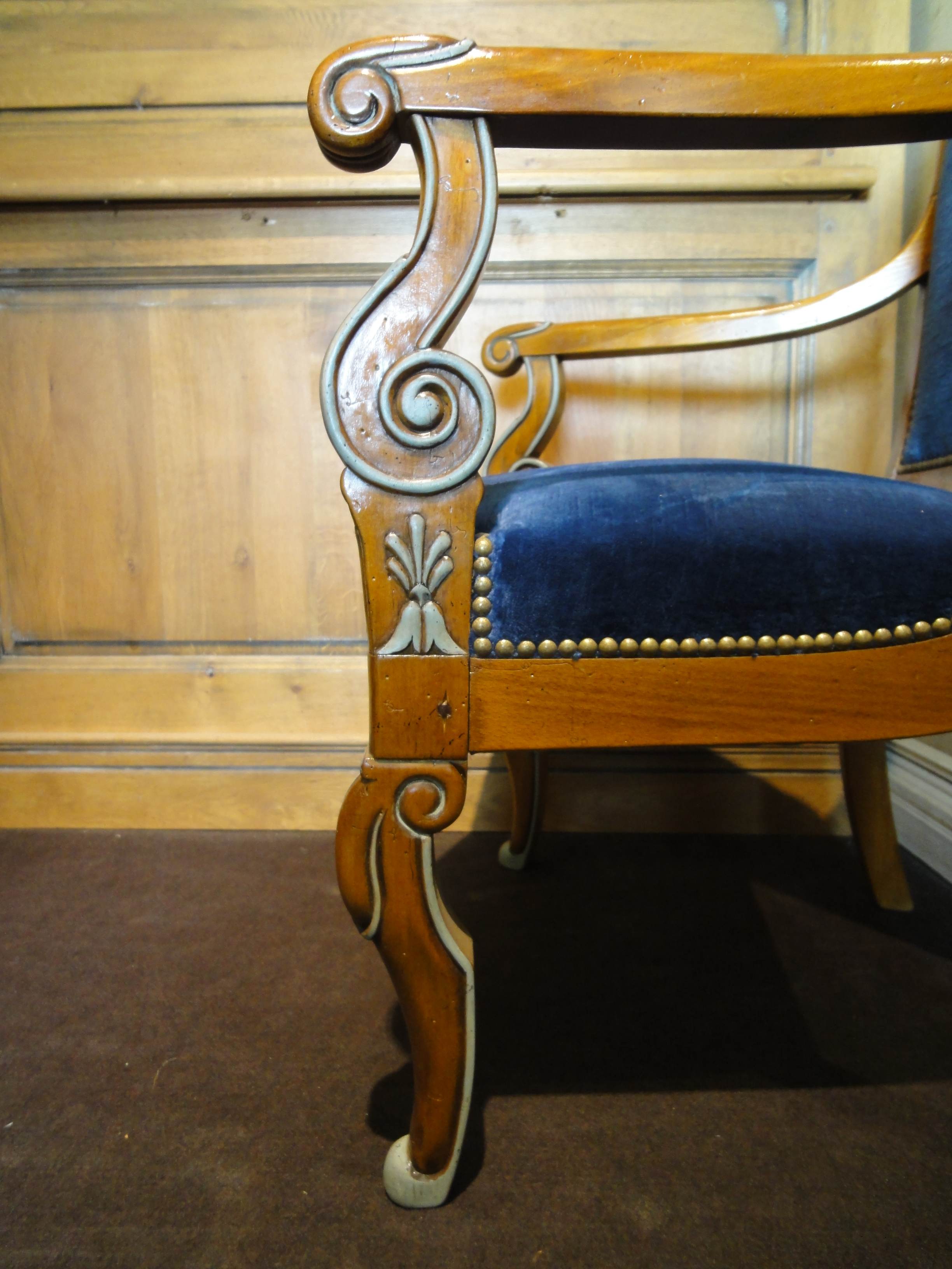 Style Louis-Philippe, réalisé par les Ateliers Allot Frères.